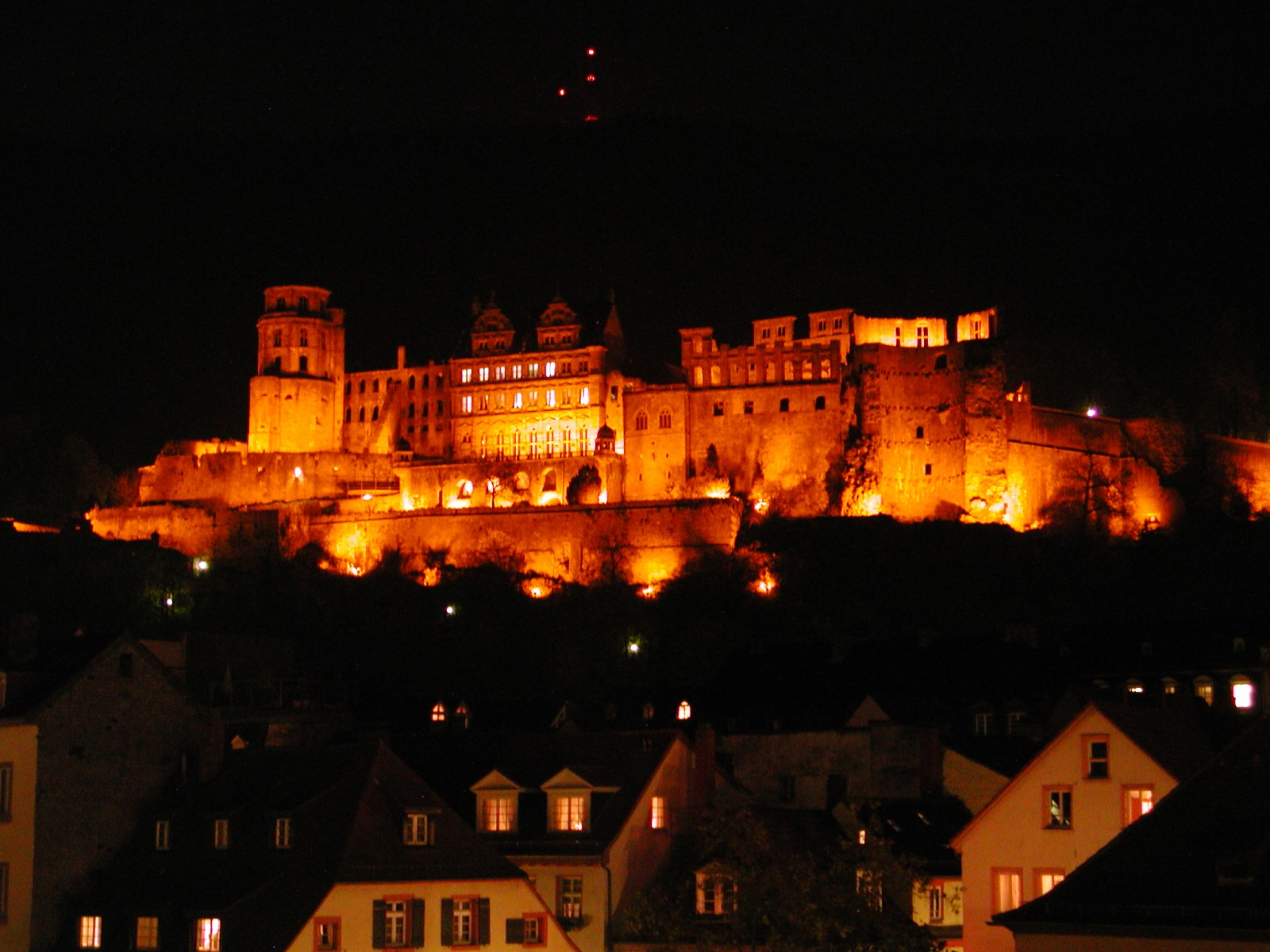 Das beleuchtete Heidelberger Schloss in der Abenddämmerung. Von der Alten Brücke aus fotografiert.